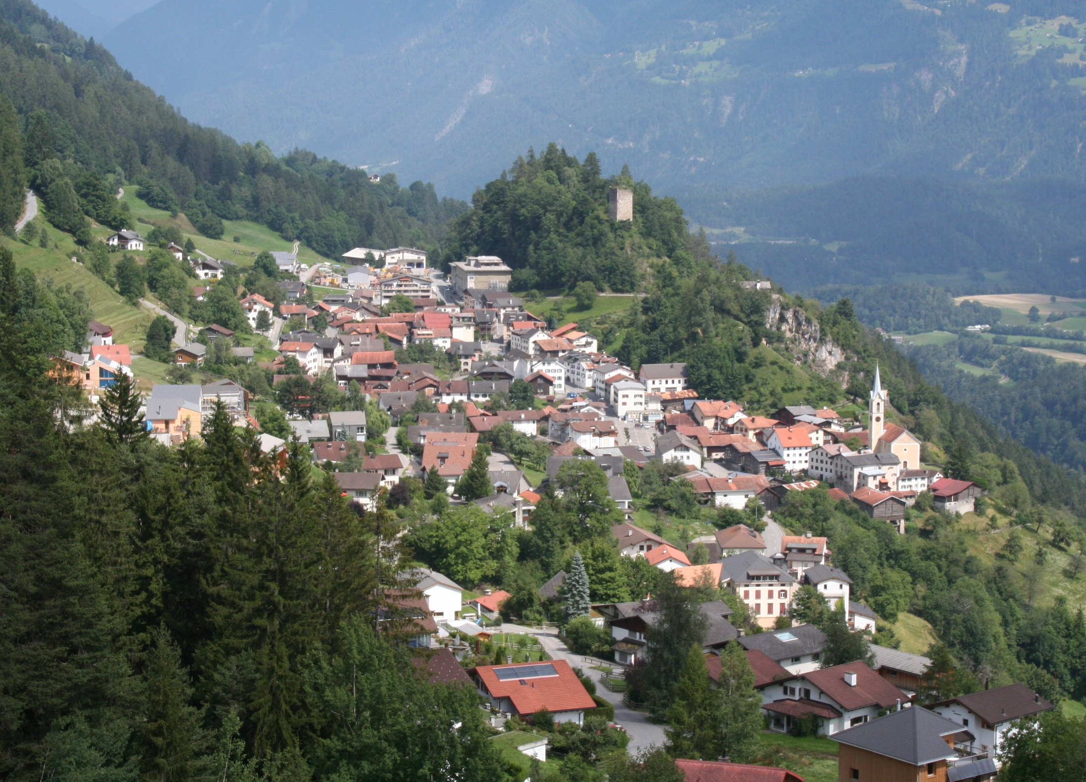 Trin mit der Ruine Canaschal